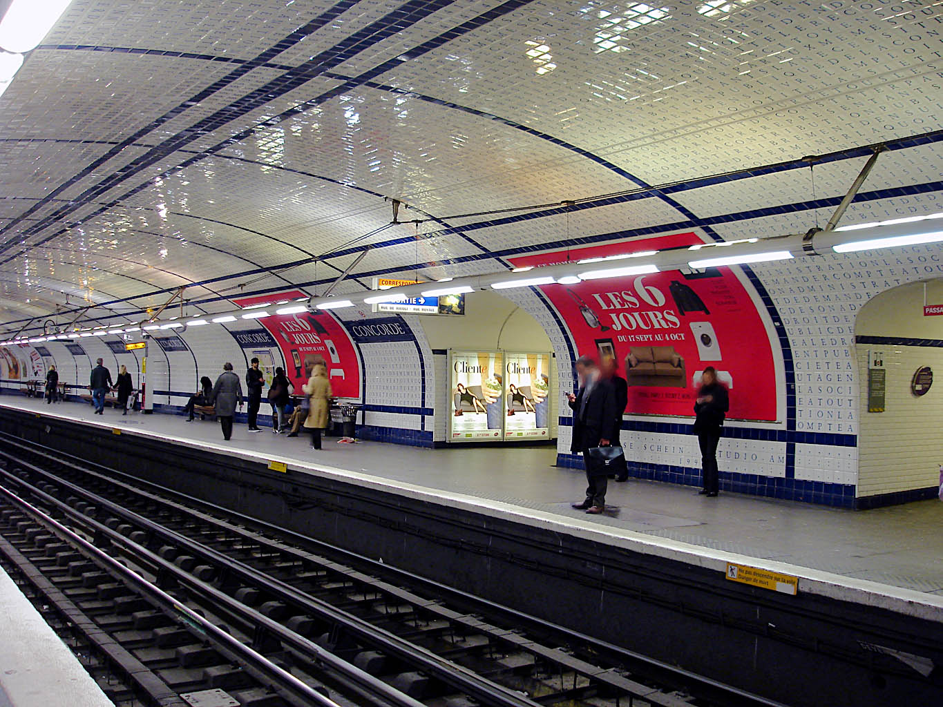 Station Concorde, de la ligne 12 du métro de Paris, France.